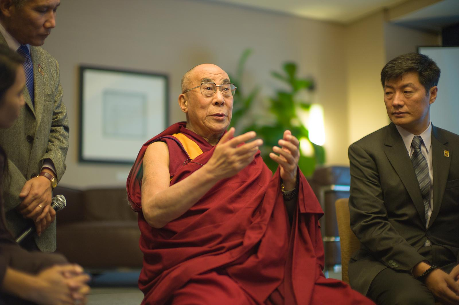 Tenzin Gyatso - 14th Dalai Lama